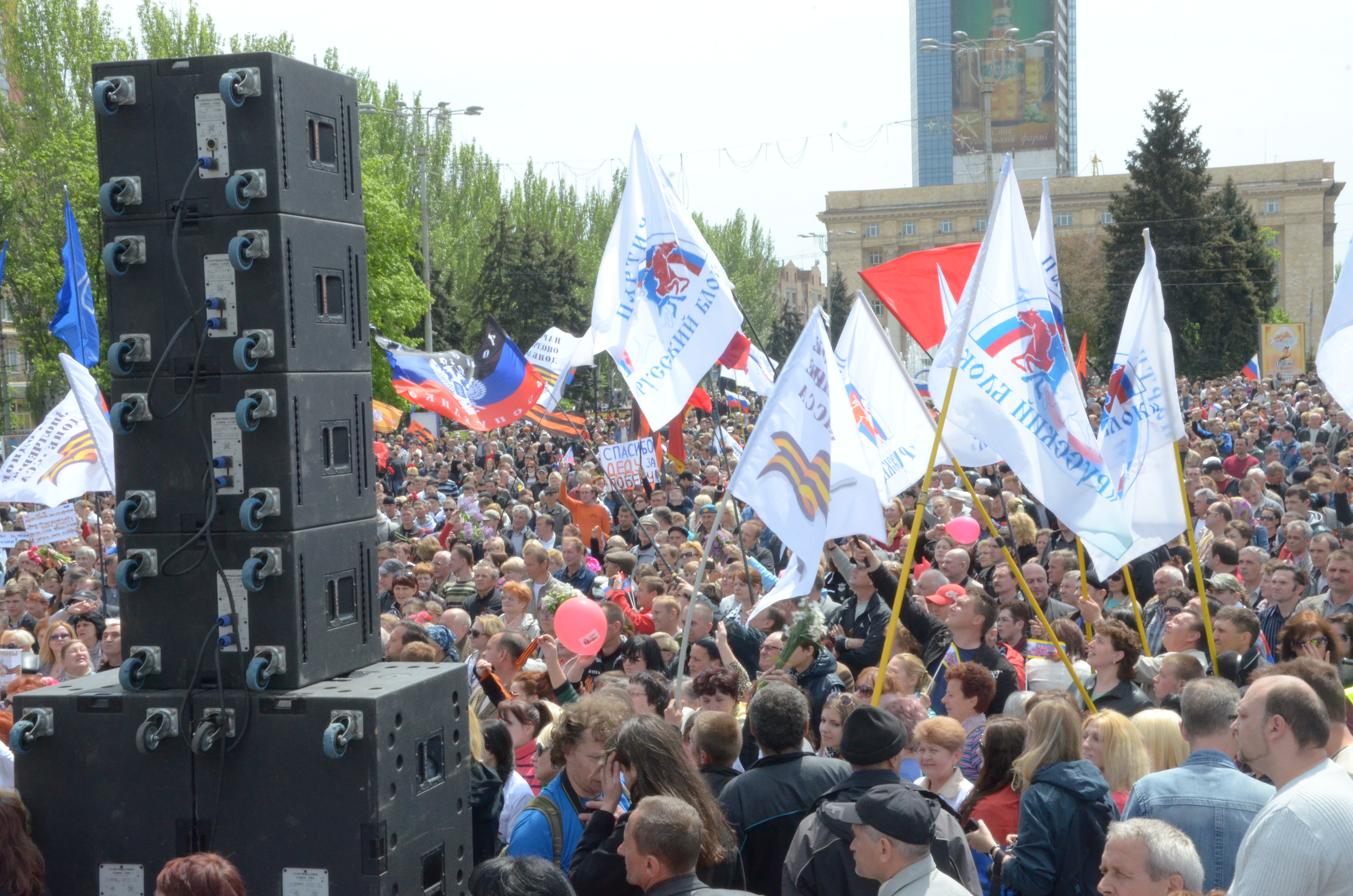 День Победы в Донецке